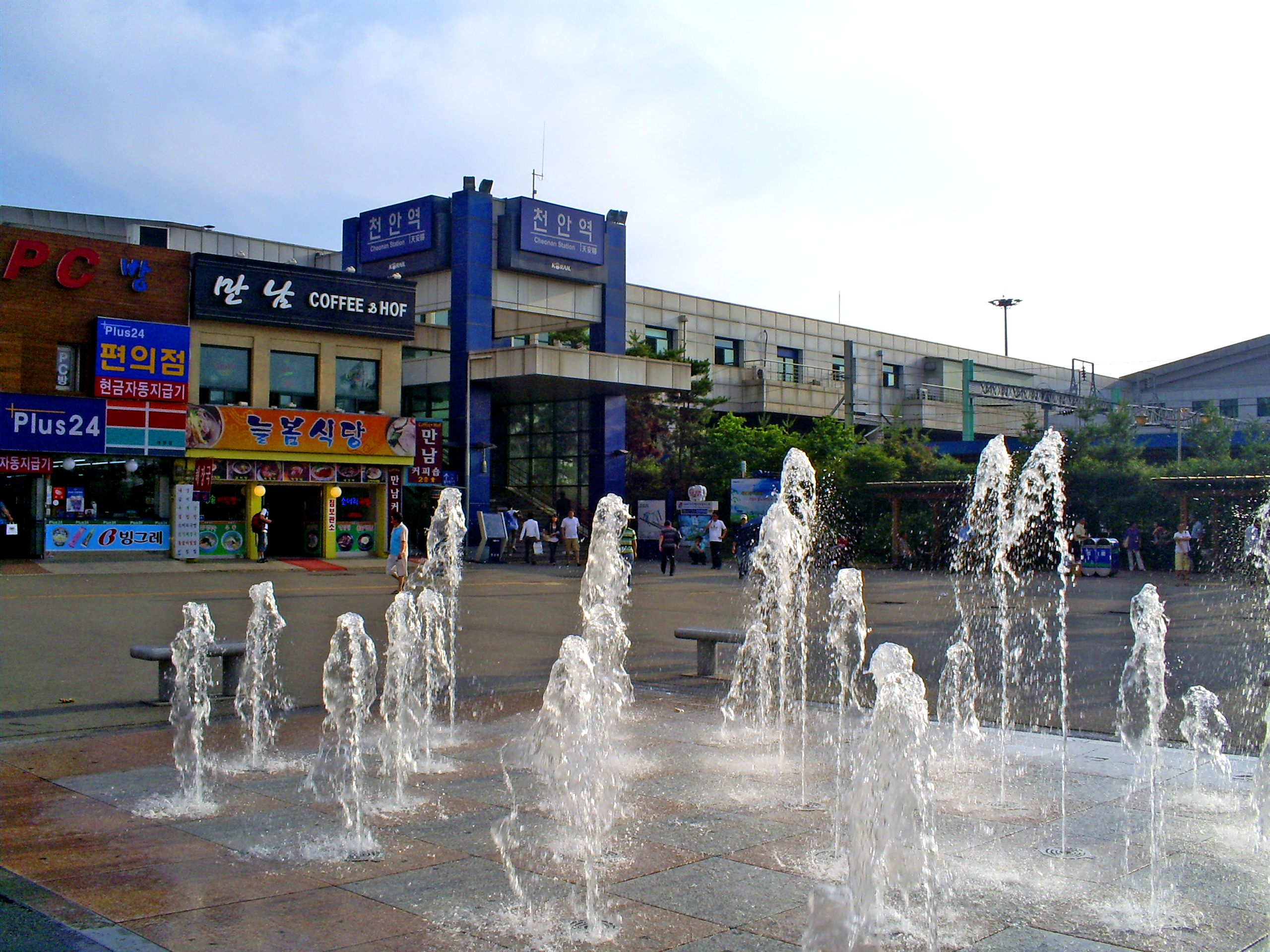 韓国鉄道公社京釜線・長項線天安駅 全景 撮影場所：天安駅東部広場